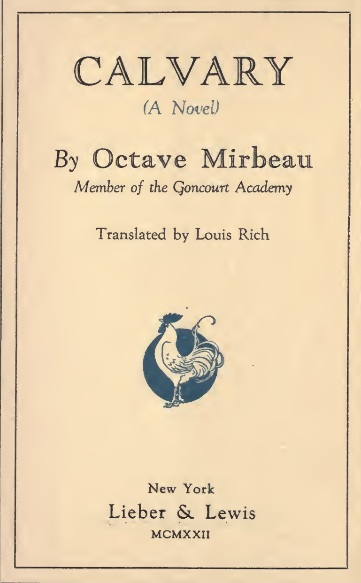 Couverture de "Calvary" traduction anglaise du "Calvaire", roman d'Octave Mirbeau (1848-1917), New York, Lieber and Lewis, 1922.